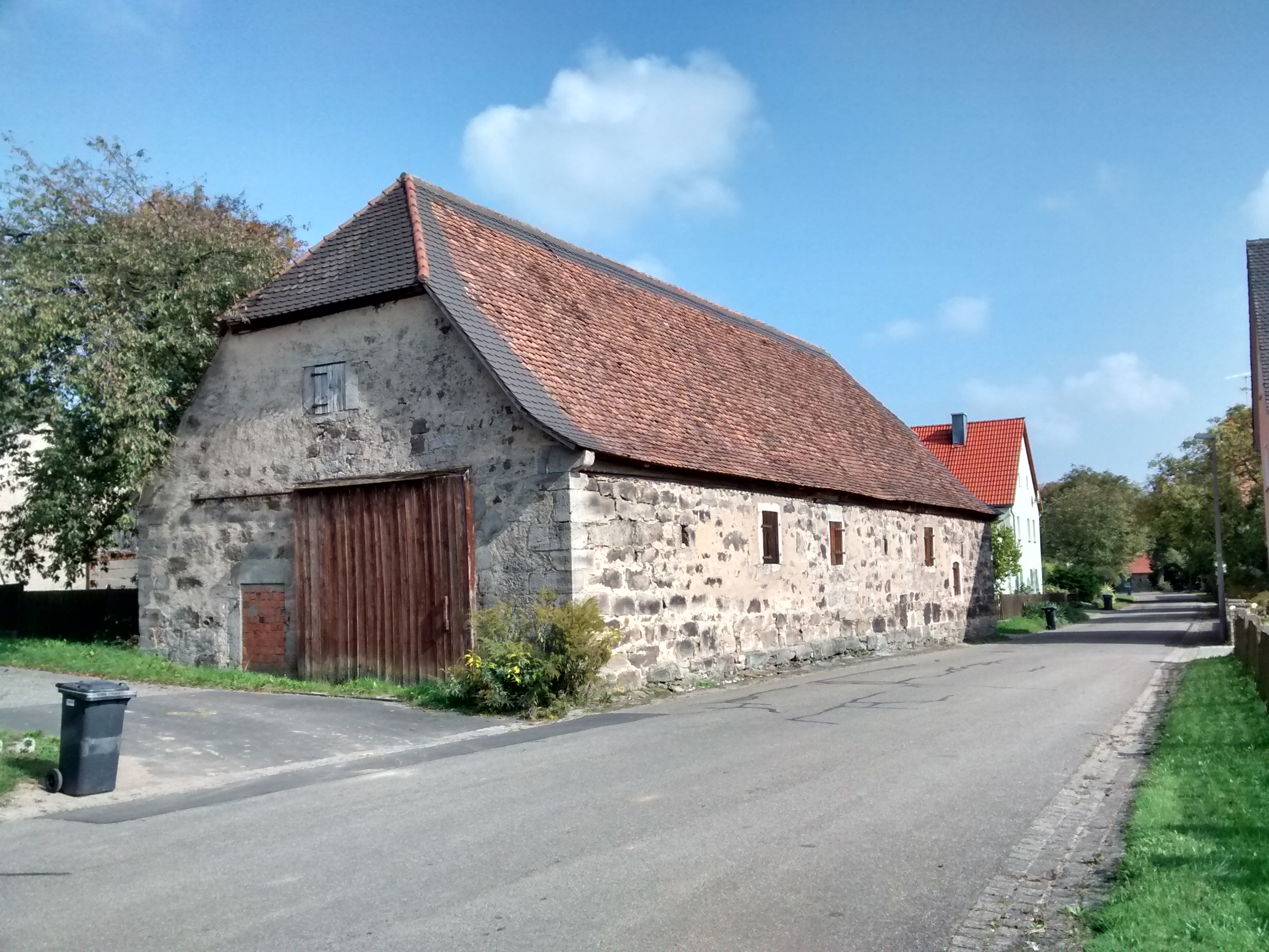 Scheune in Buchklingen